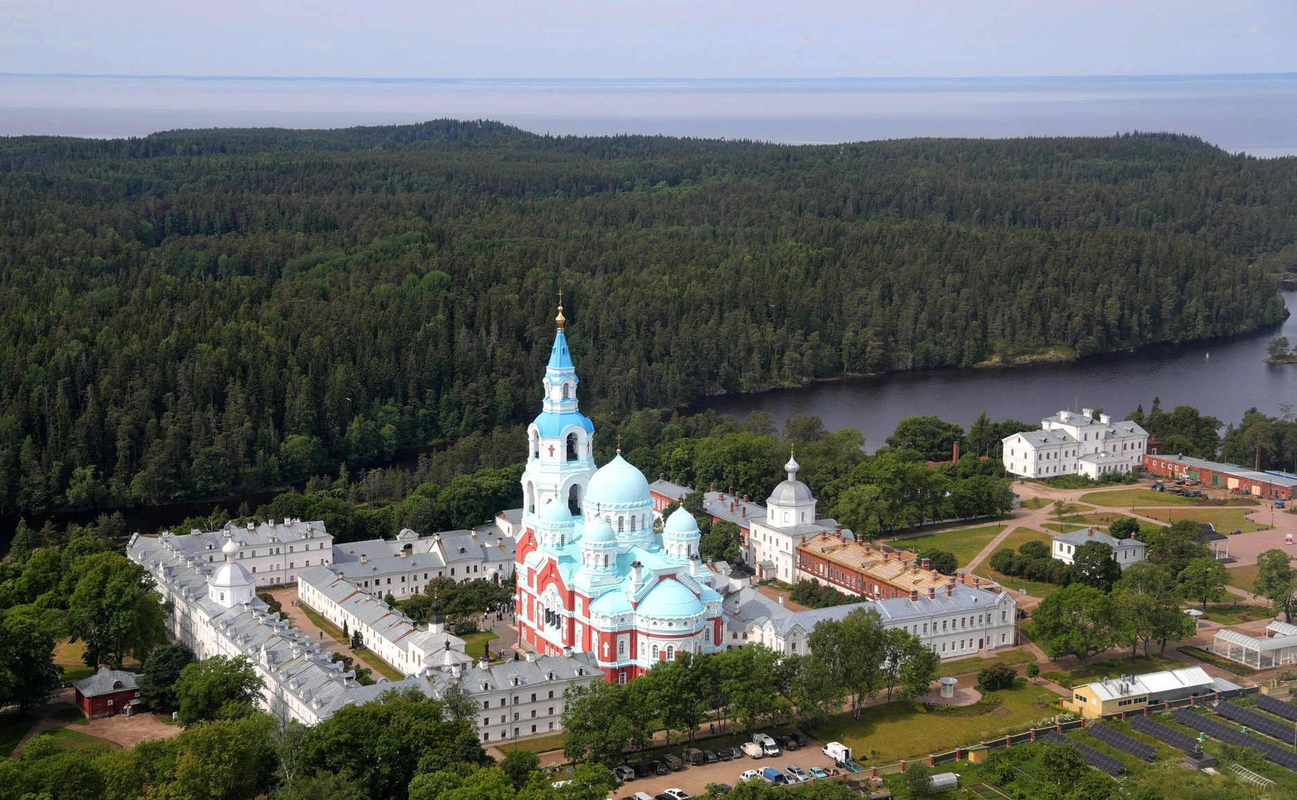 Спасо-Преображенский Валаамский ставропигиальный монастырь